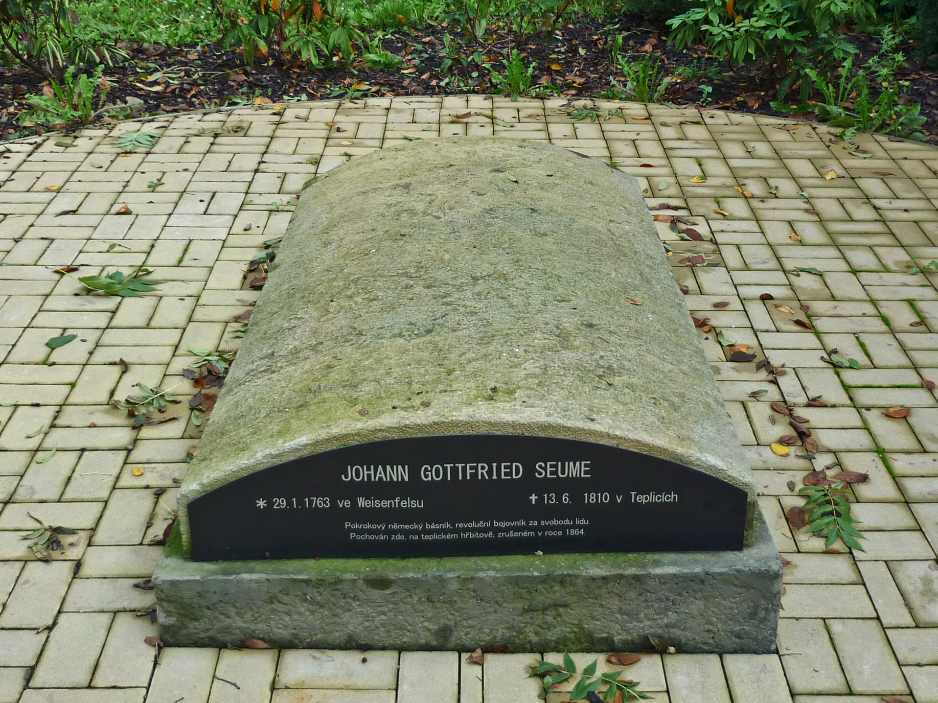 Seume-Grab neben der Seume-Kapelle in Teplitz (Teplice)